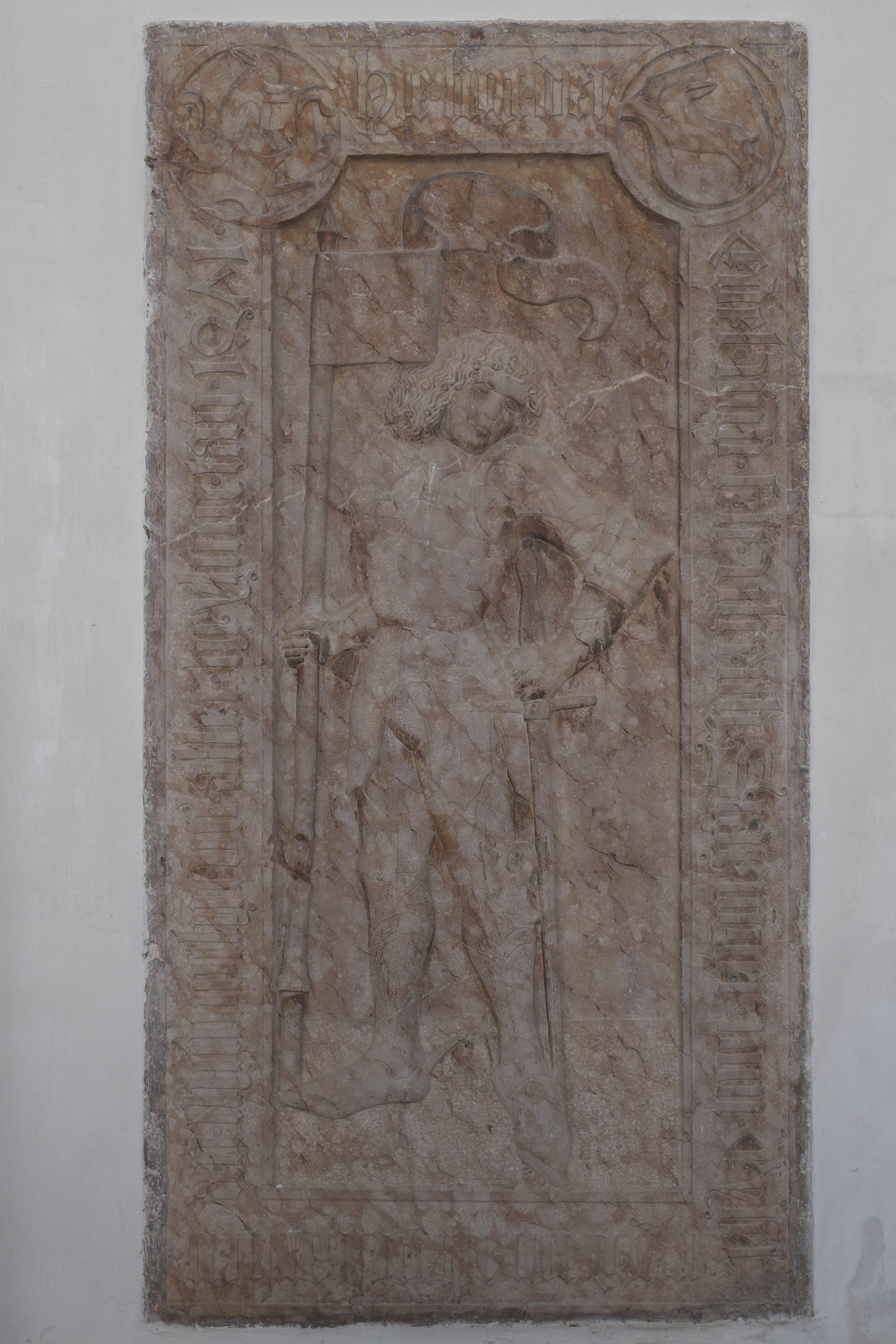 Katholische Pfarrkirche St. Johannes Baptist in Bergkirchen im Landkreis Dachau (Bayern/Deutschland), Rotmarmorgrabstein für Ulrich Sätzlinger von Eisolzried († 1471), von Matthäus Haldner